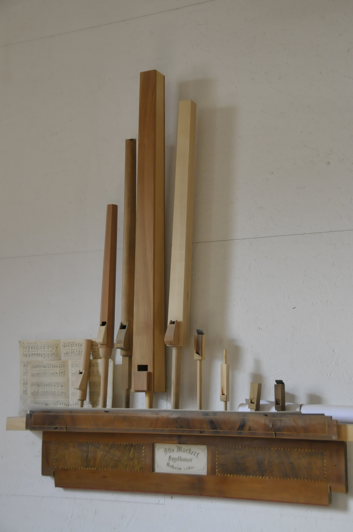 Wandregal von Orgelbauer Otto Markert mit Orgelpfeifensammlung